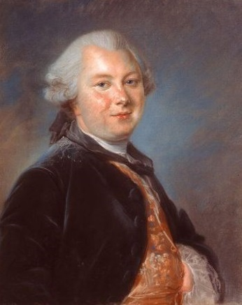 Portrait présumé de François-Dominique du Boisbaudry (1724-1798) par Louis Vigée (1715-1767), papier (pastel), XVIIIe siècle.